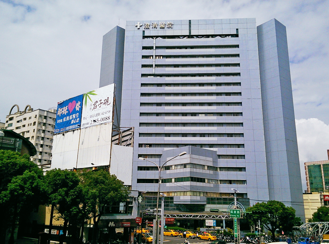 中文（台灣）: 從臺中市西屯區臺灣大道四段人行天橋拍攝澄清醫院中港院區。